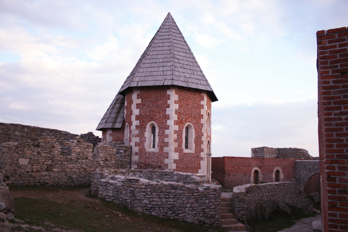 Medvedgrad, Zagreb, Hrvatska